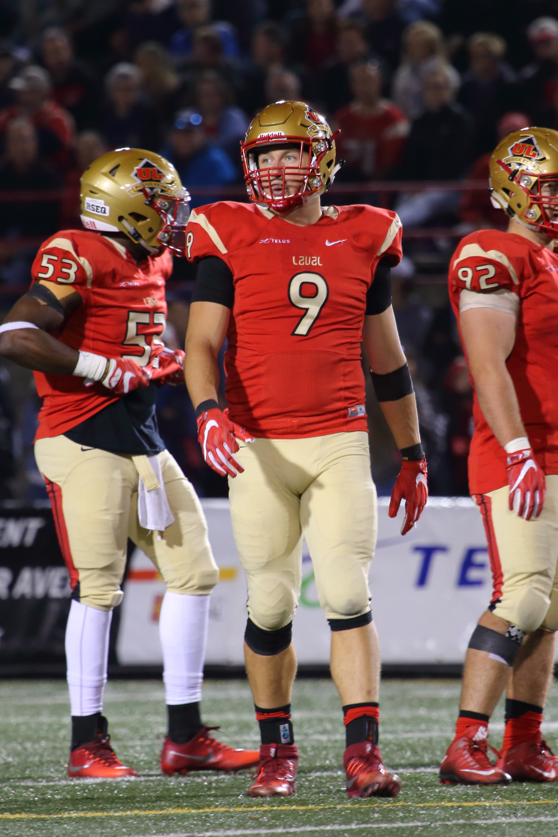 Mathieu Betts dur Rouge et Or de l'Université Laval